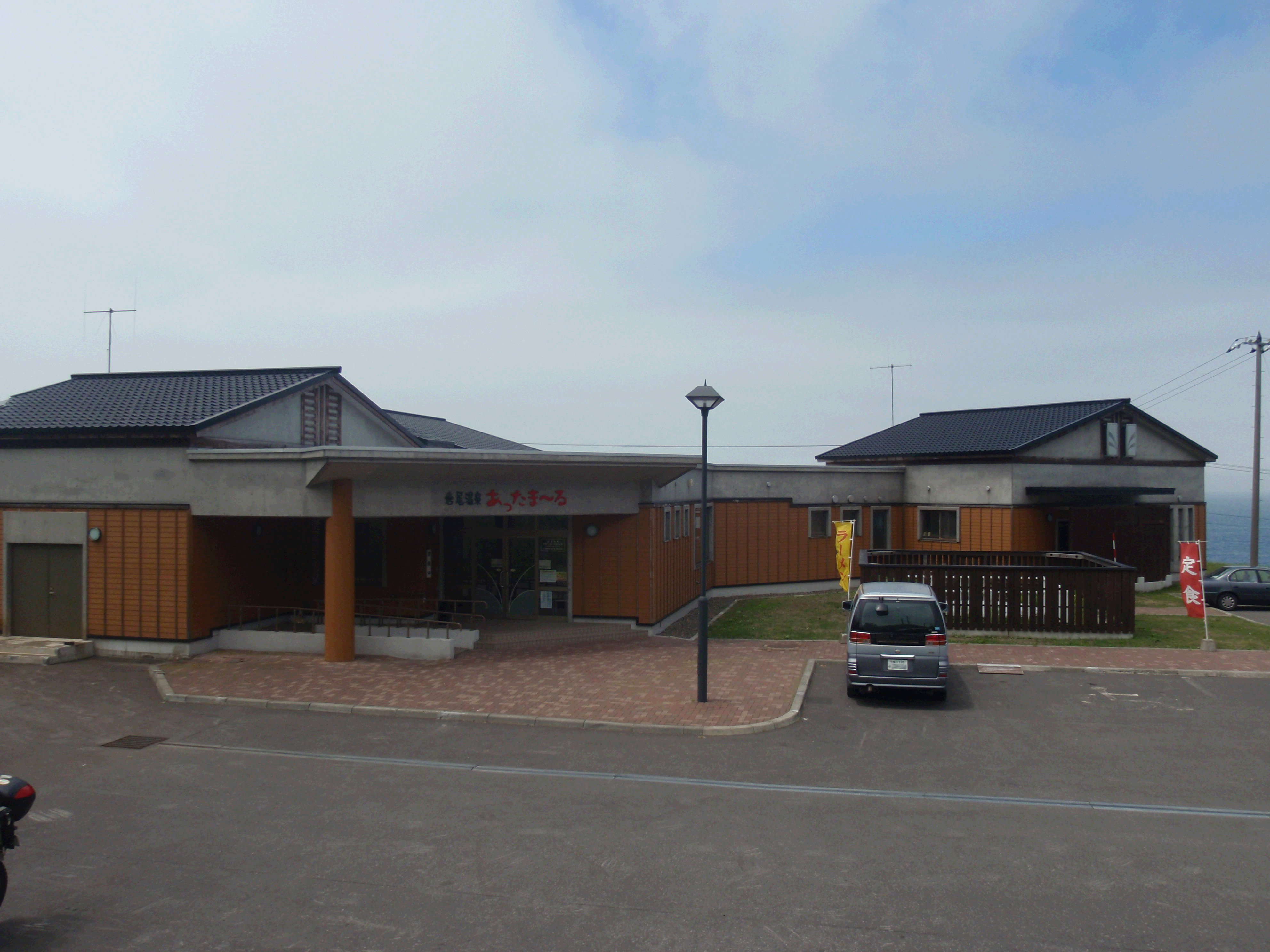 岩尾温泉、あったま～る